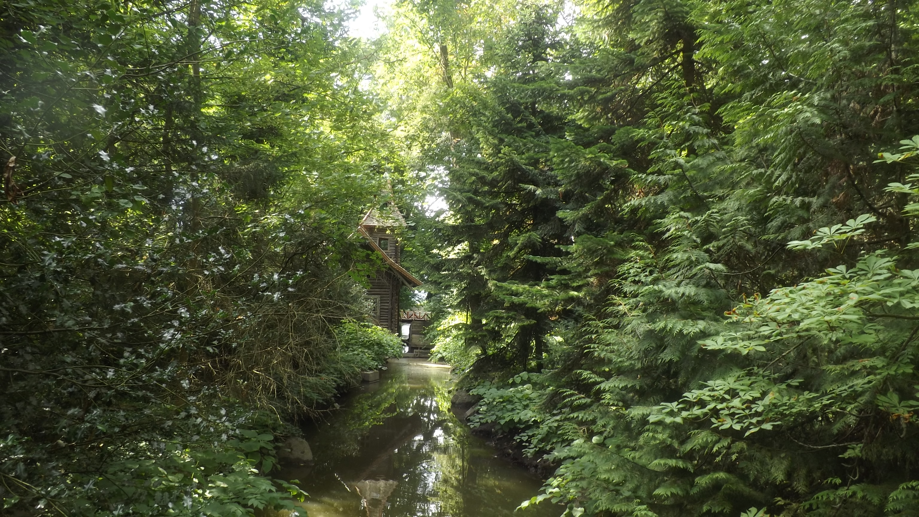 Vácrátóti botanikuskert